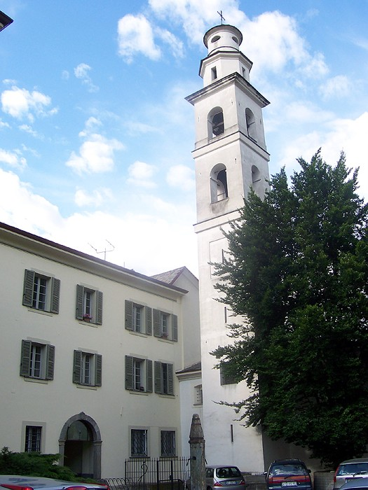 Tirano - Campanile della ex Chiesa di S. Agostino